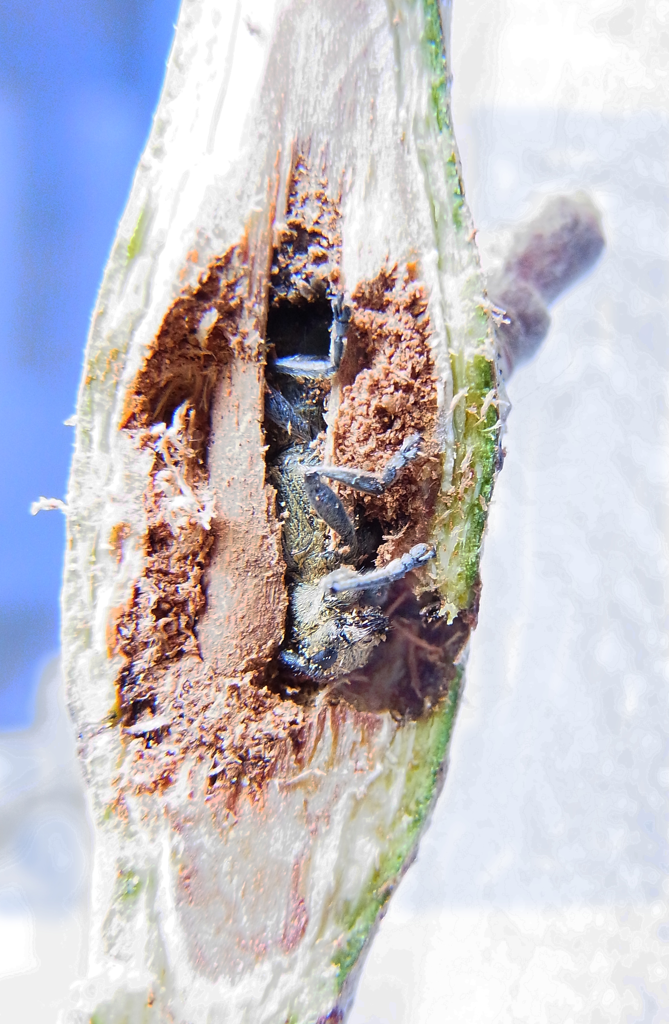 Lage von Saperda populnea in Puppenwiege in Pappelzweig, Puppenwiege künstlich seitlich geöffnet.